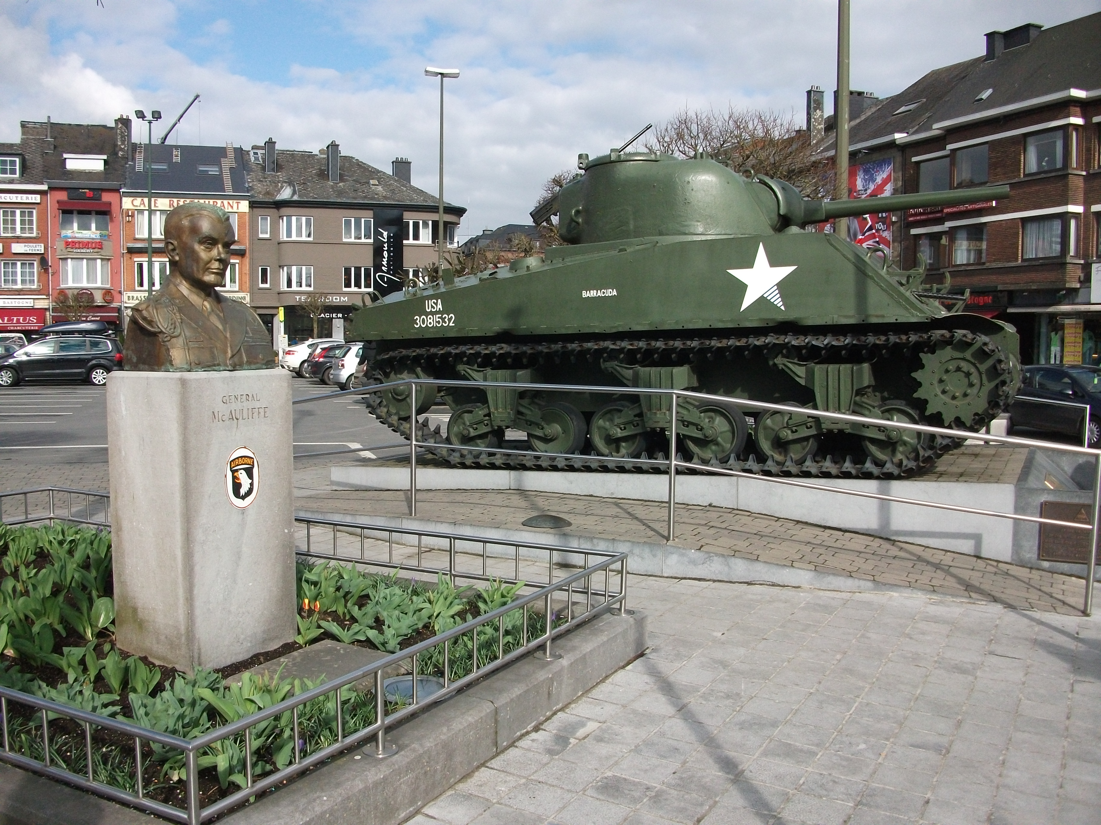 Buste McAuliffe en Sherman tank